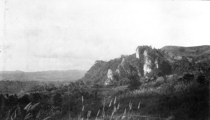 Foto. Gezicht op de Goenoeng Masigit, West Java